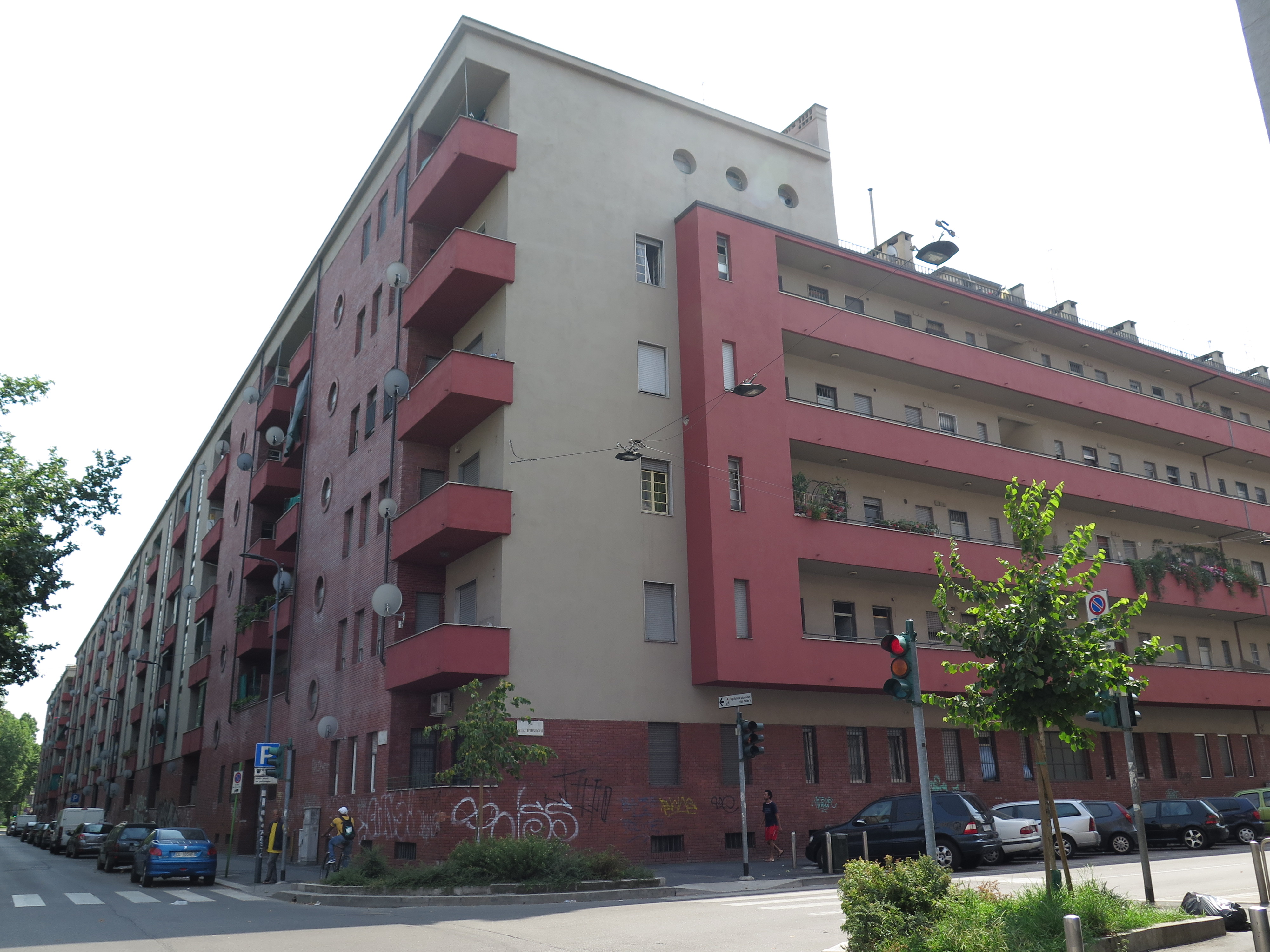 Stabili popolari in piazzale Cuoco a Milano